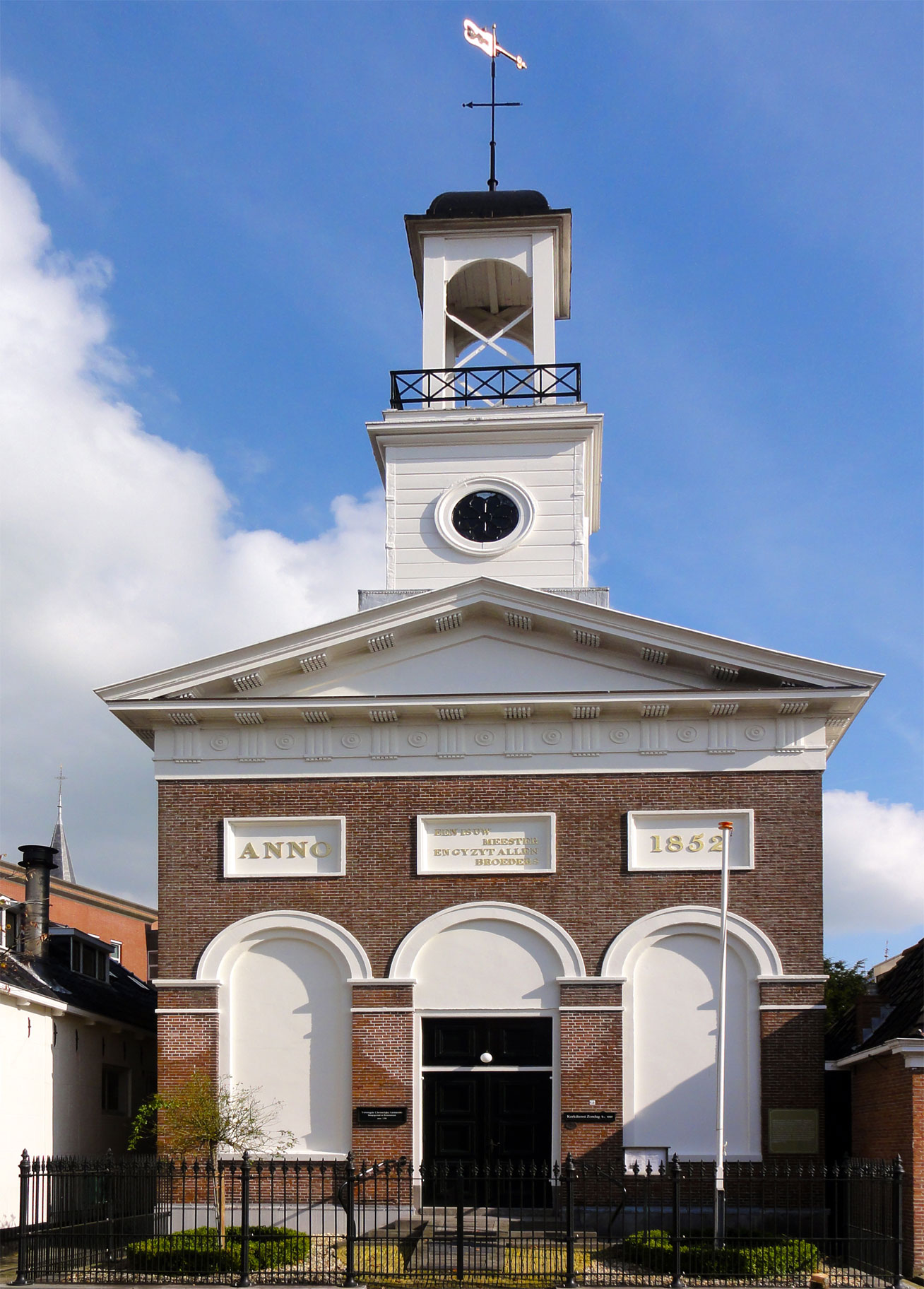 Legeweg 14 Dokkum, rijksmonument